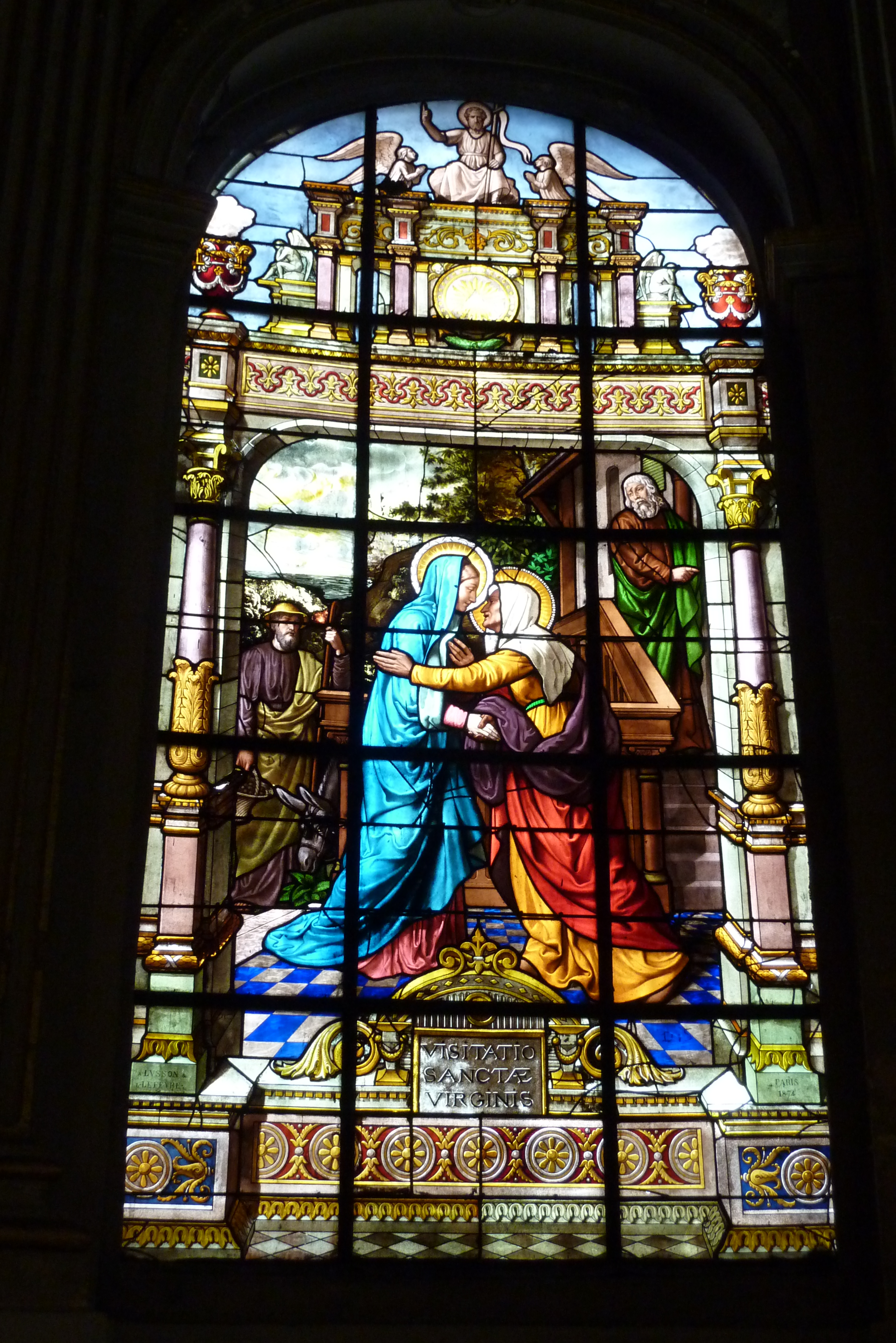 Katholische Pfarrkirche Saint-Laurent im 10. Arrondissement von Paris, Bleiglasfenster von Antoine Lusson (fils) und Léon Lefèvre von 1874/75, in der Kapelle Notre-Dame-des-Malades; Darstellung: Mariä Heimsuchung; Signatur: A. LUSSON & L. LEFEVRE (links unten), PARIS 1874 (rechts unten)